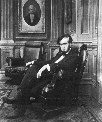 Imagen de la película On Secret Service, dirigida en 1912 por Thomas H. Ince o por Walter Edwards, en la que Francis Ford aparece caracterizado como Abraham Lincoln.